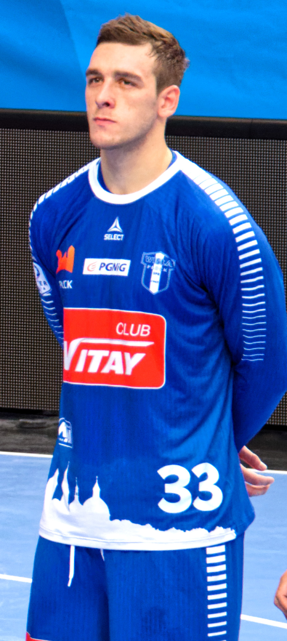 Rencontre de phase de groupe de la Ligue des champions 2016-17. A Coubertin, le 2 octobre 2016.